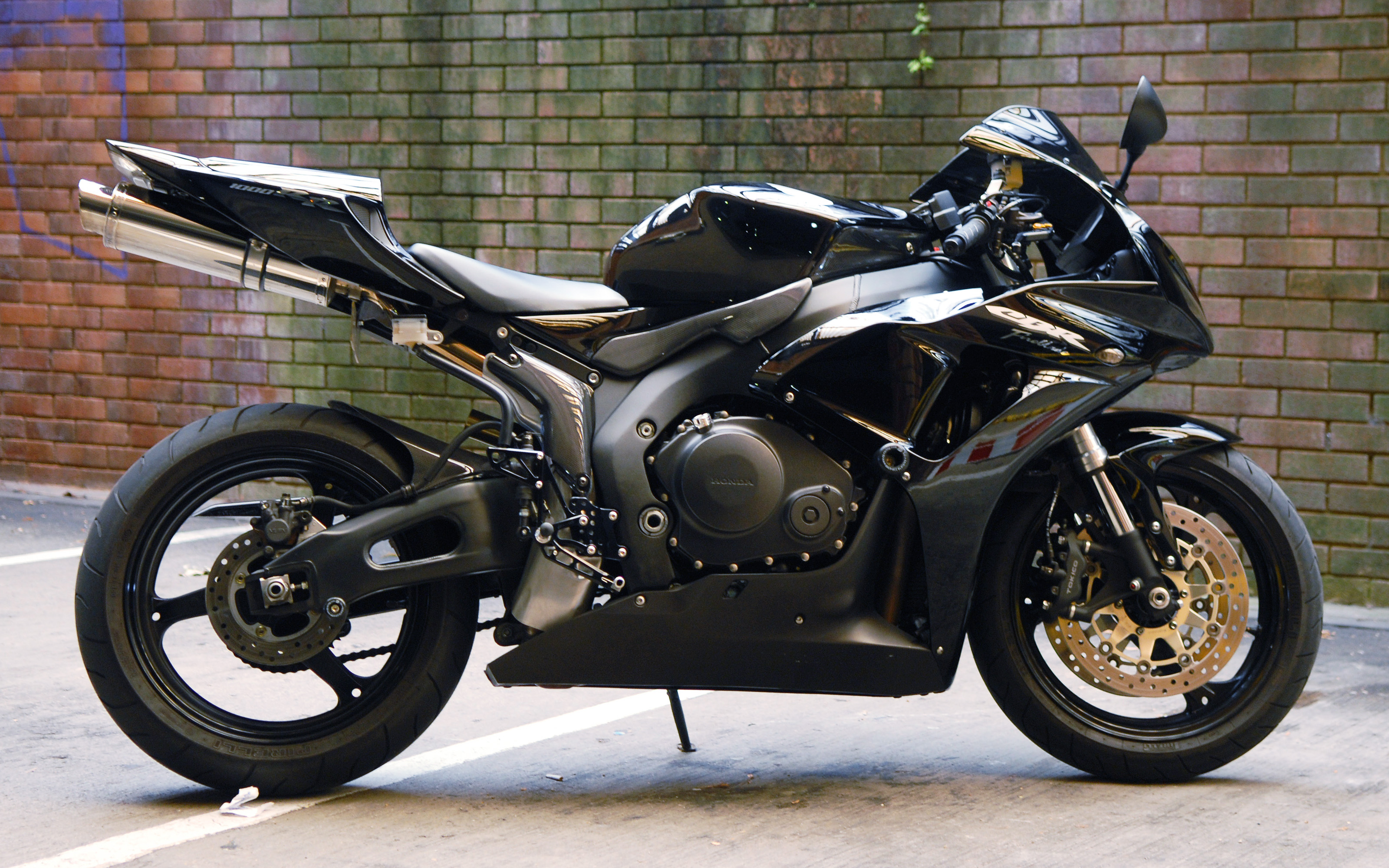 Honda CBR1000RR